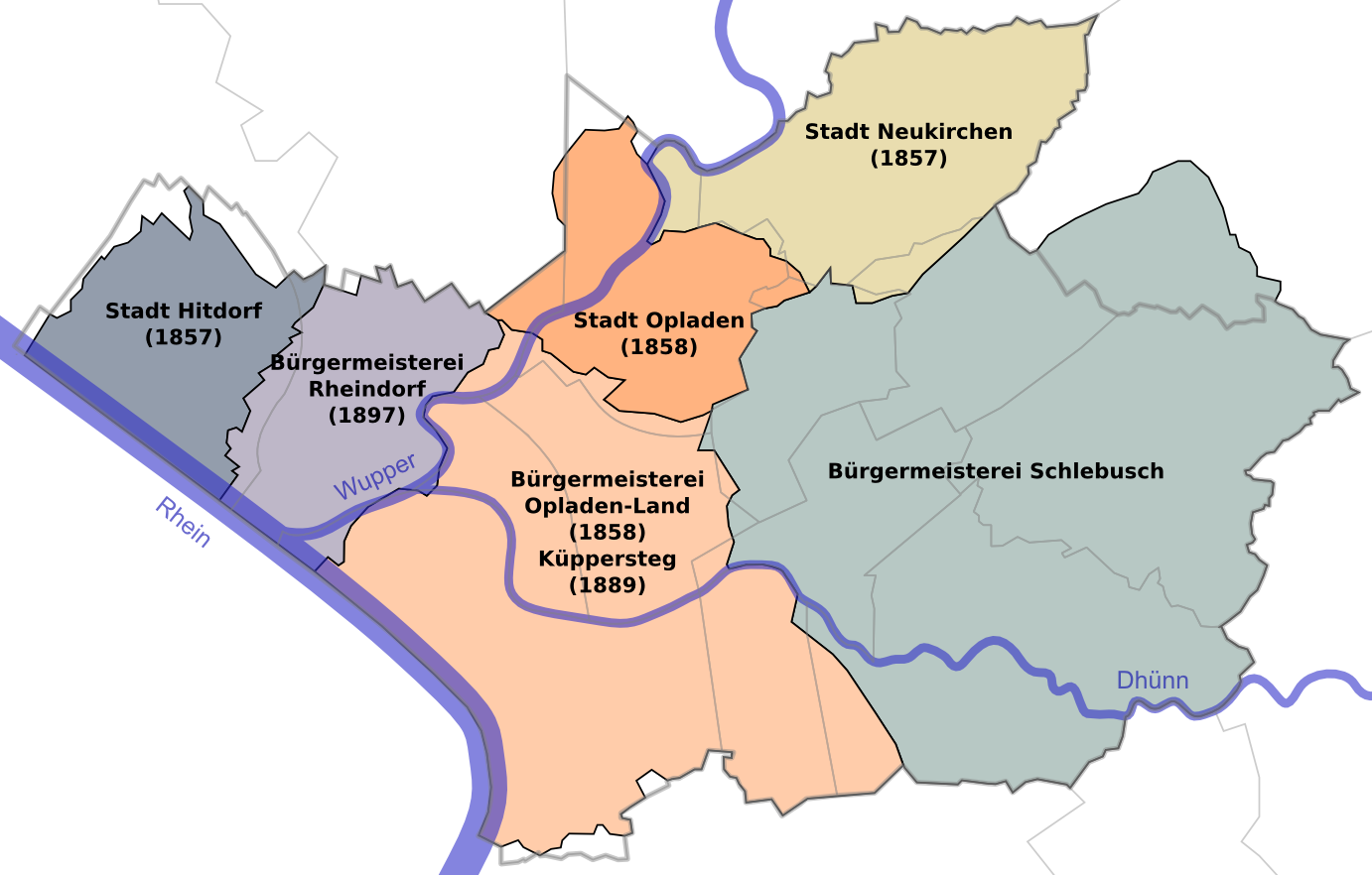 Karte des heutigen Leverkusener Gebiets um 1897. Die heutigen Stadt- bzw. Stadtteilgrenzen sind grau eingezeichnet.